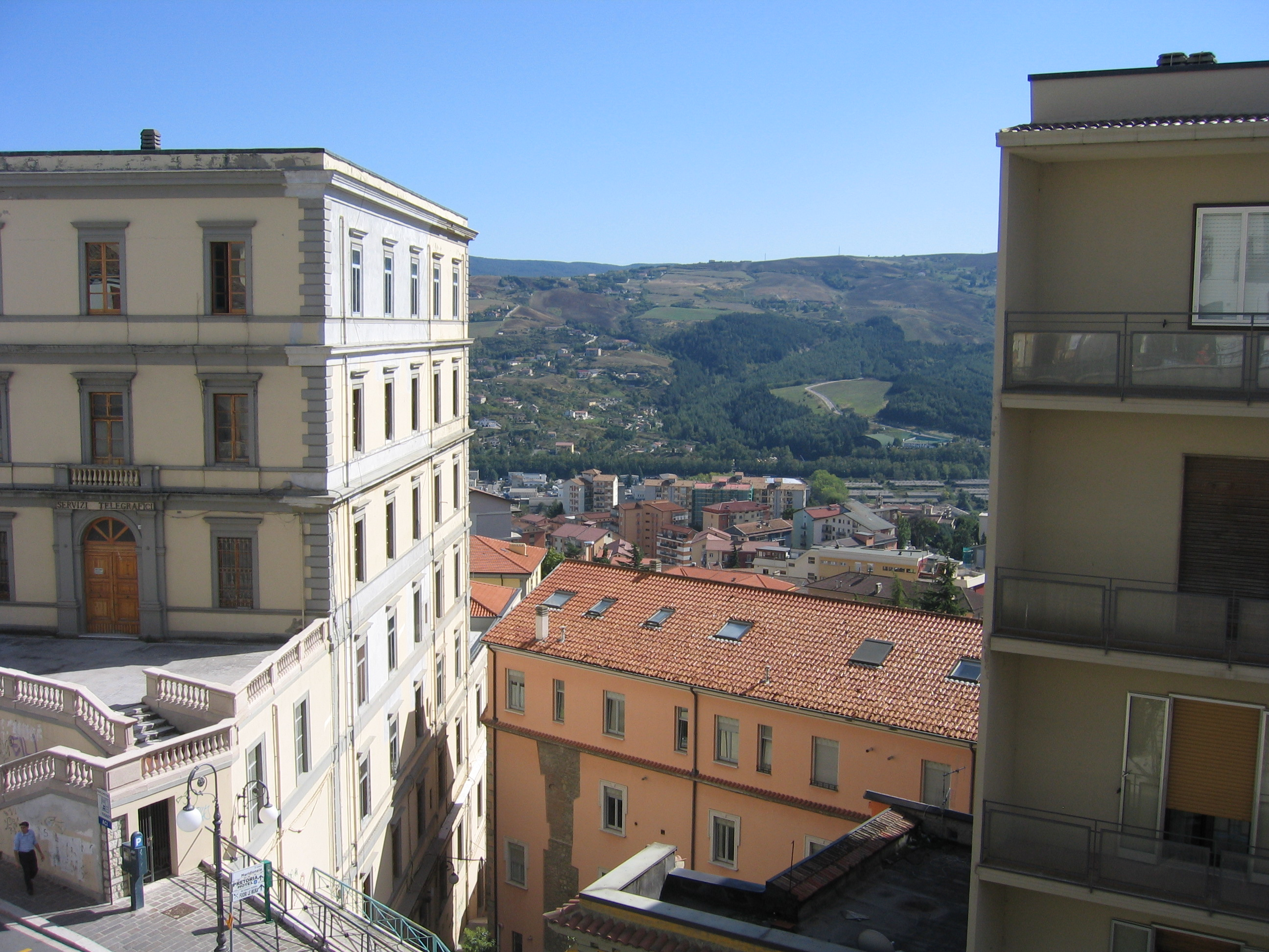 Calle de Potenza